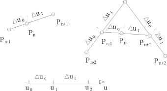 Skladani beziera polygon